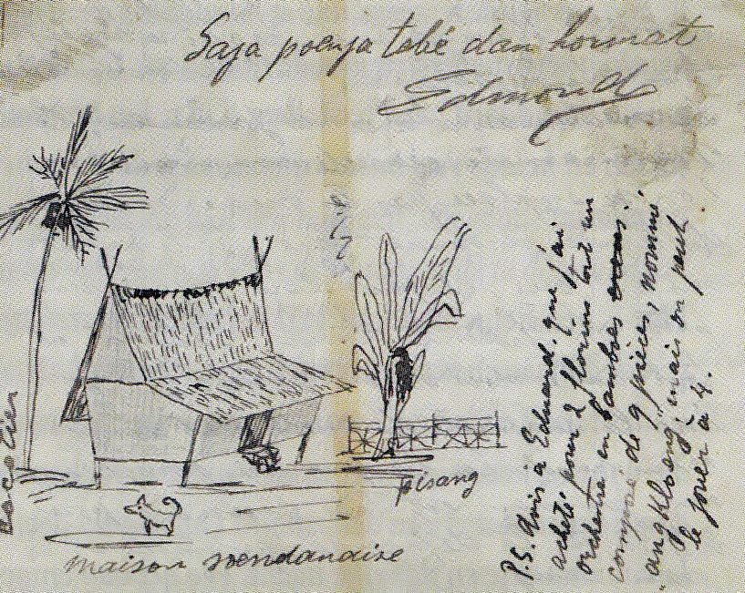 Detail van een brief geschreven door Edmond Regout tijdens zijn Indië-reis op 7 oktober 1898. Edmond was de tweede zoon van de Maastrichtse industrieel Gustave Regout en een kleinzoon van Petrus I Regout. Tussen 1895 en 1903 maakte hij drie reizen naar Amerika en Azië. Familiearchief Regout, RHCL Maastricht.